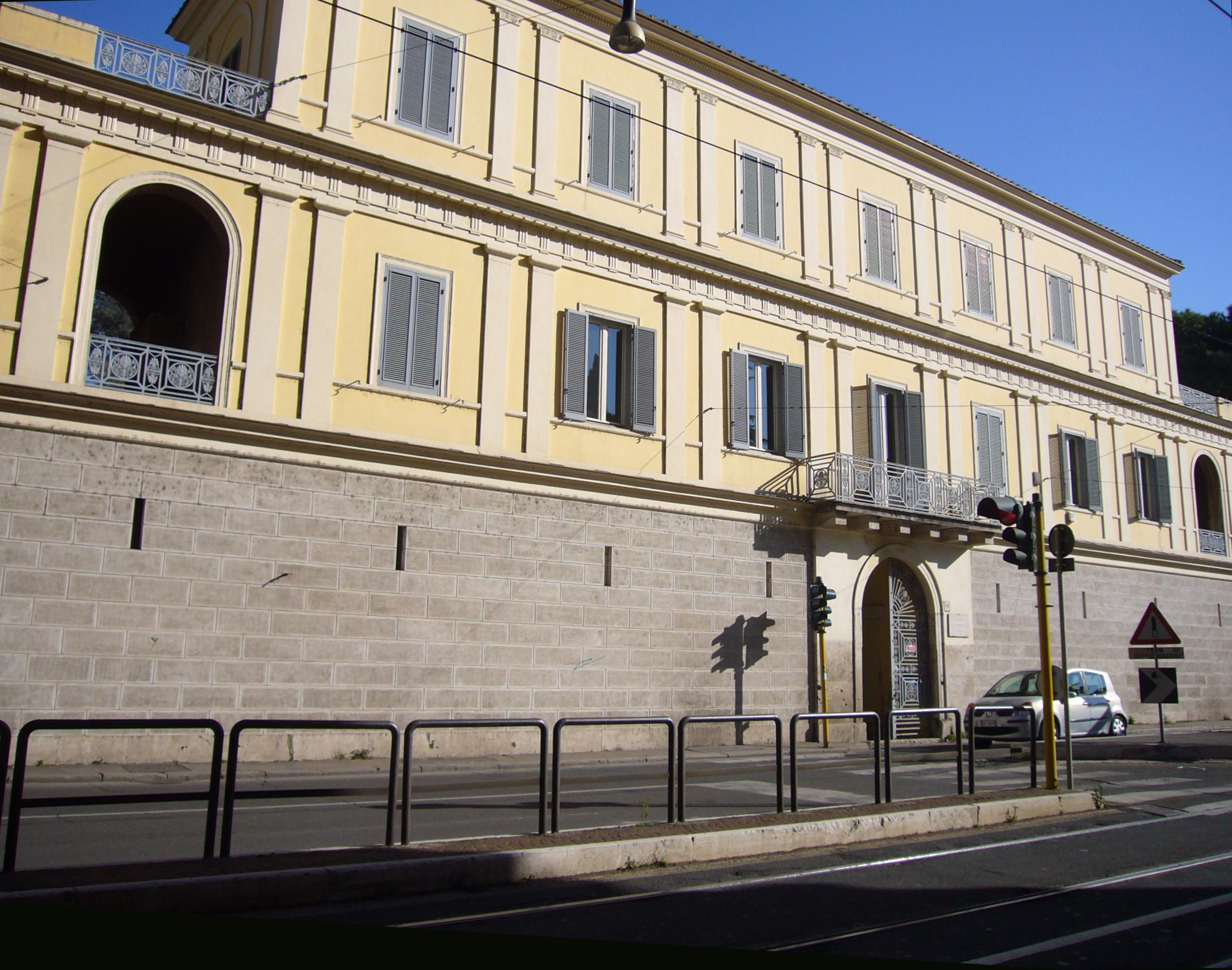 Roma, via Flaminia: villino Vagnuzzi, sede dell'Accademia Filarmonica Romana